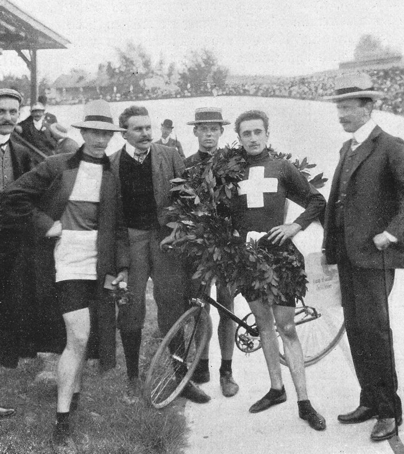 Edmond Audemars (1882-1970), cycliste suisse